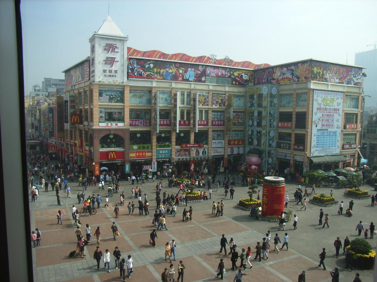 廣州 上下九步行街 ShangKiaJiu Square, GuangZhou, PRChina